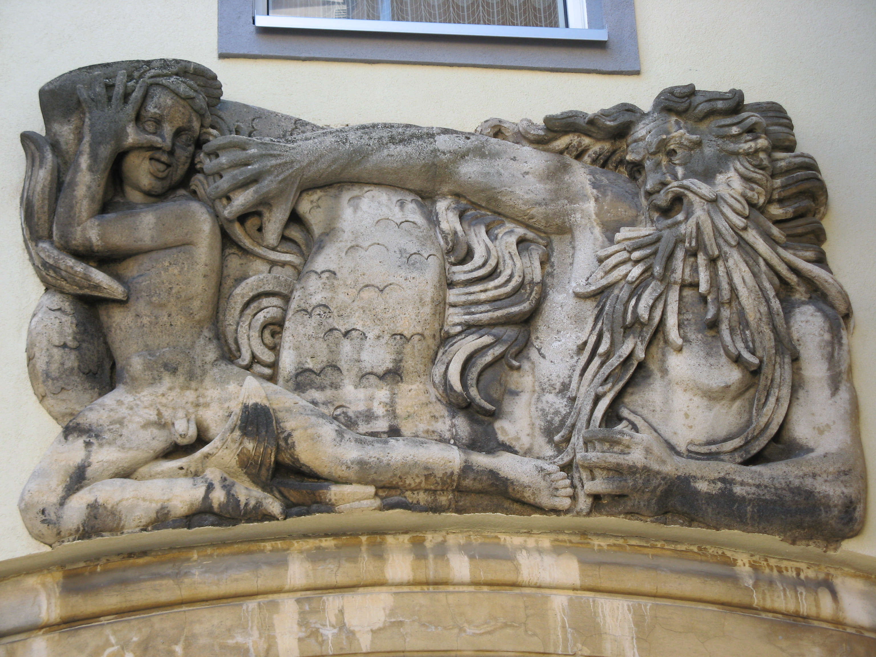 Der Wassermann von Wilhelmsdorf, Sandsteinrelief von Alphons Riedel, 1949-50, in der Rauchgasse 15-17, Wien-Meidling